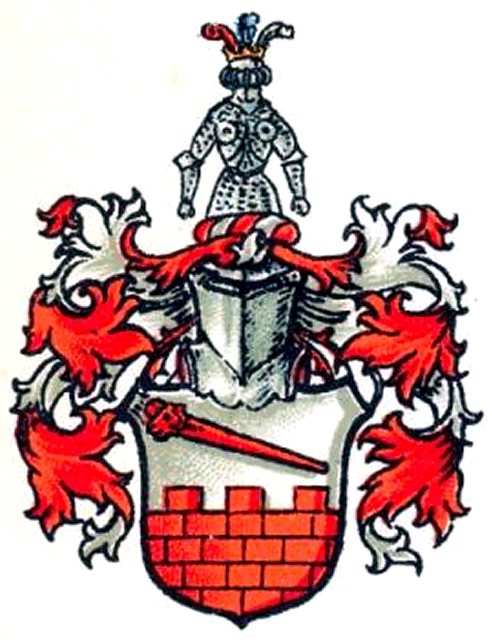 Wappen derer von Bornstaedt